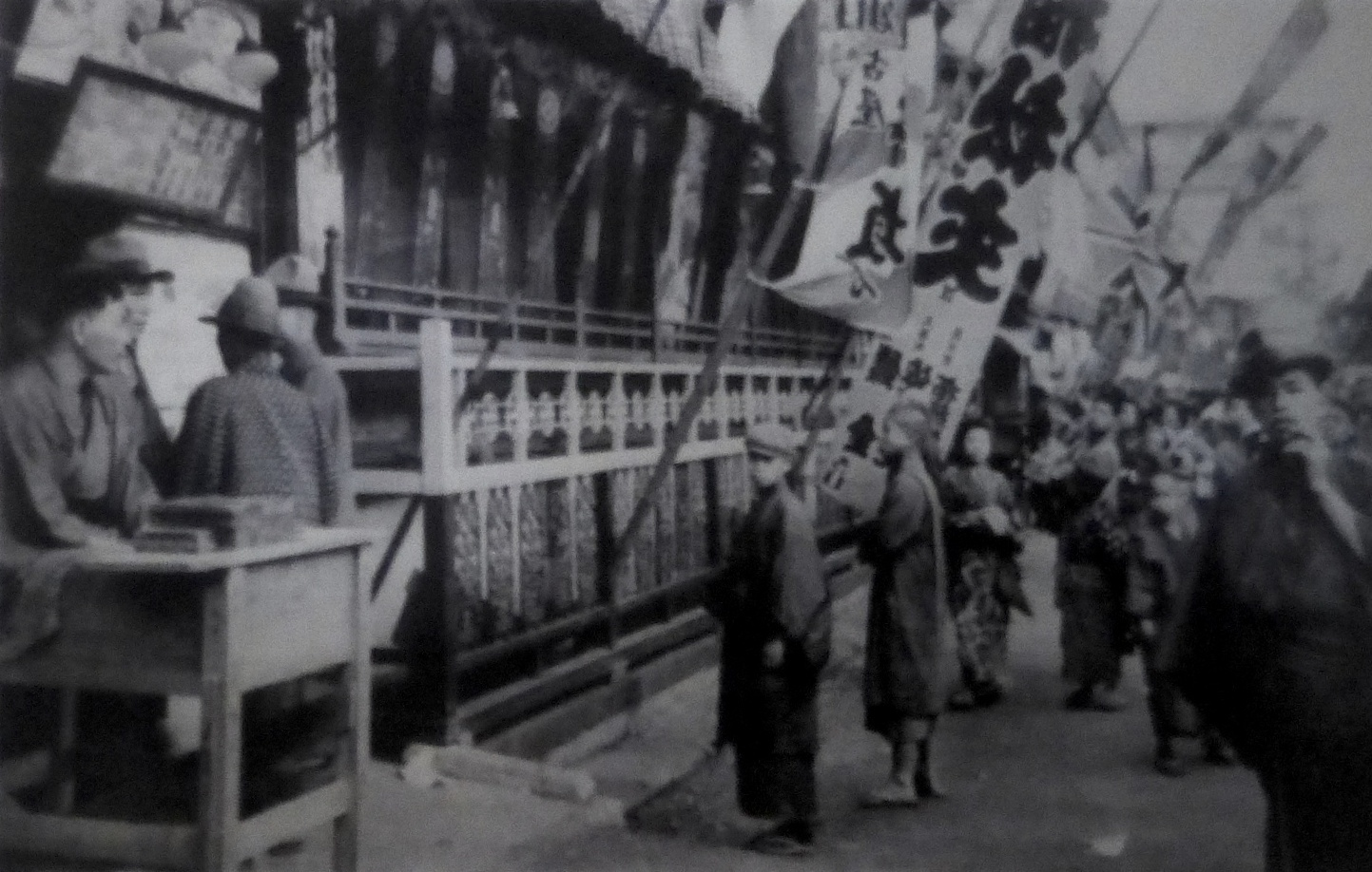 浅草の寄席 (entertainment hall [yose] in Asakusa)